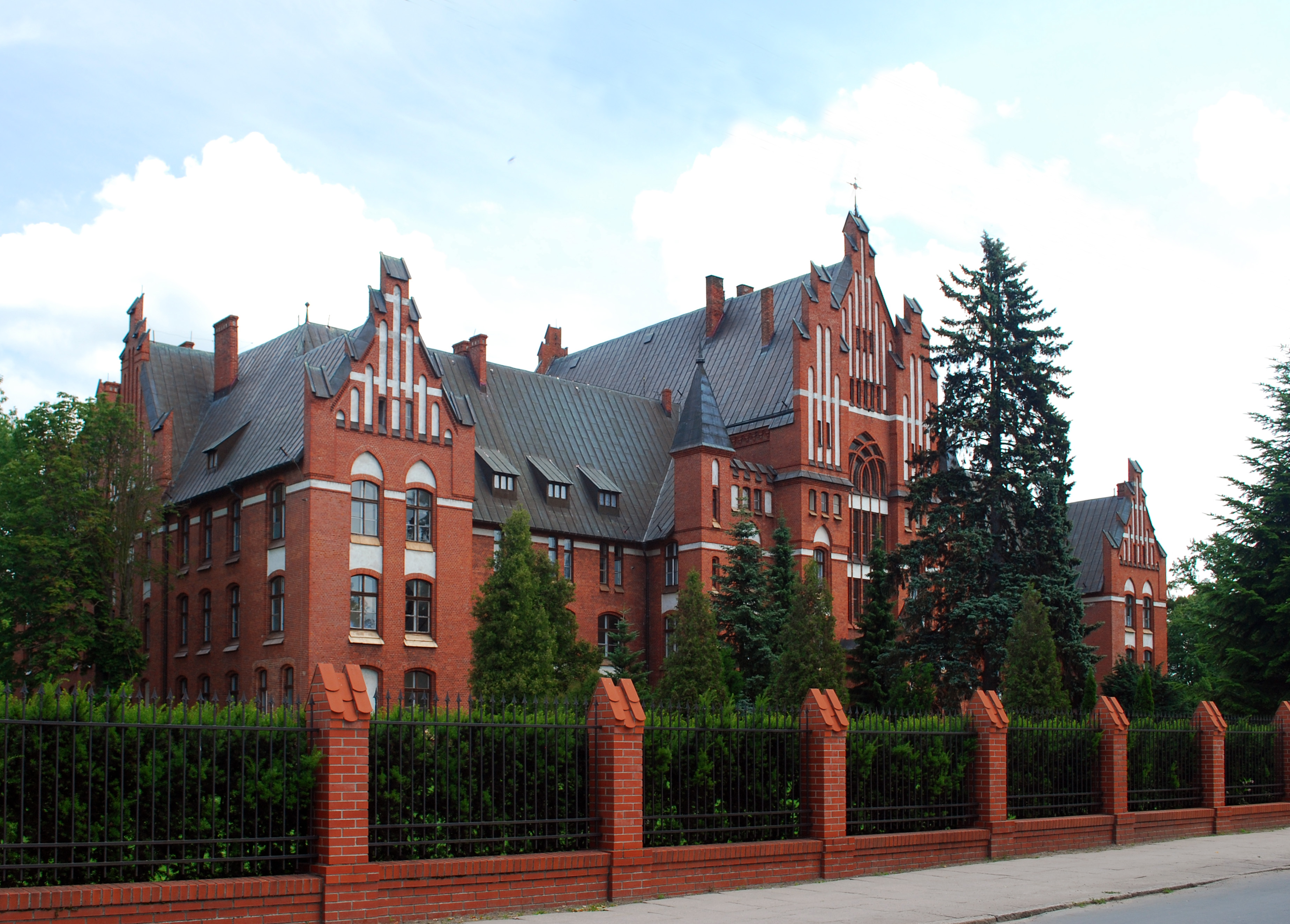 Klasztor sióstr pw. św. Katarzyny Braniewie